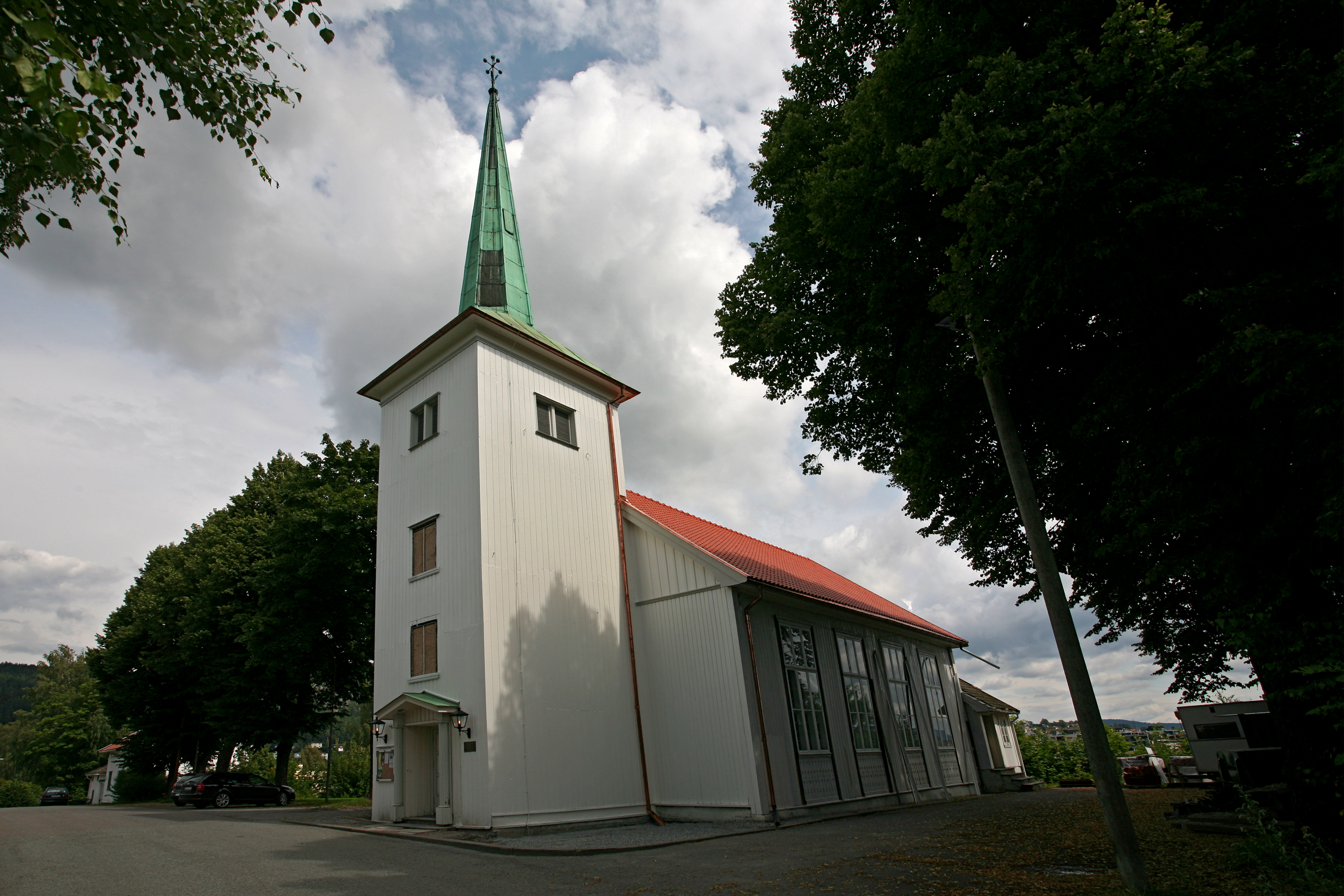 Picture of Strømsgodset kirke (Buskerud - Norway)